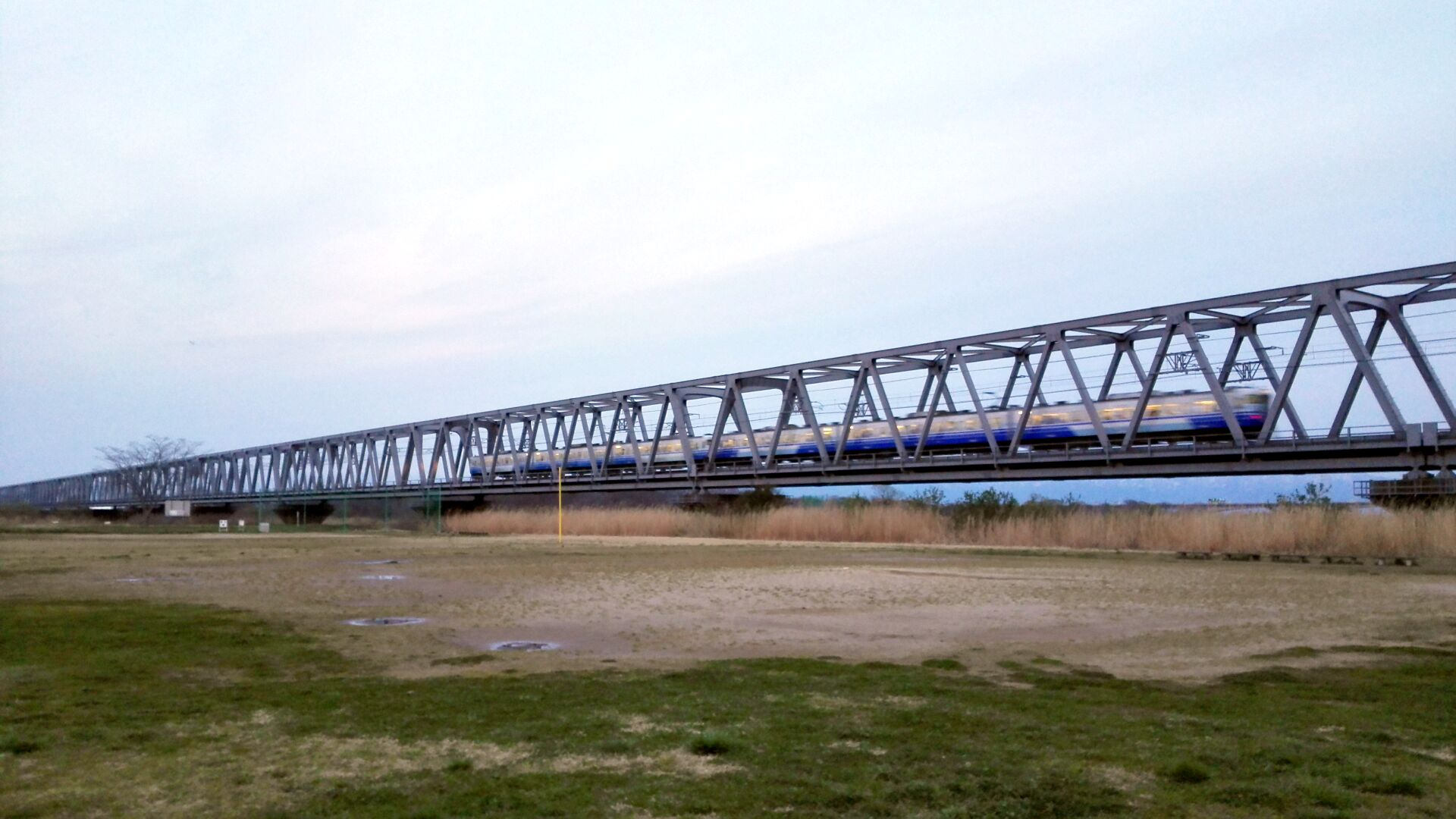 阿賀野川橋梁（下流側から）